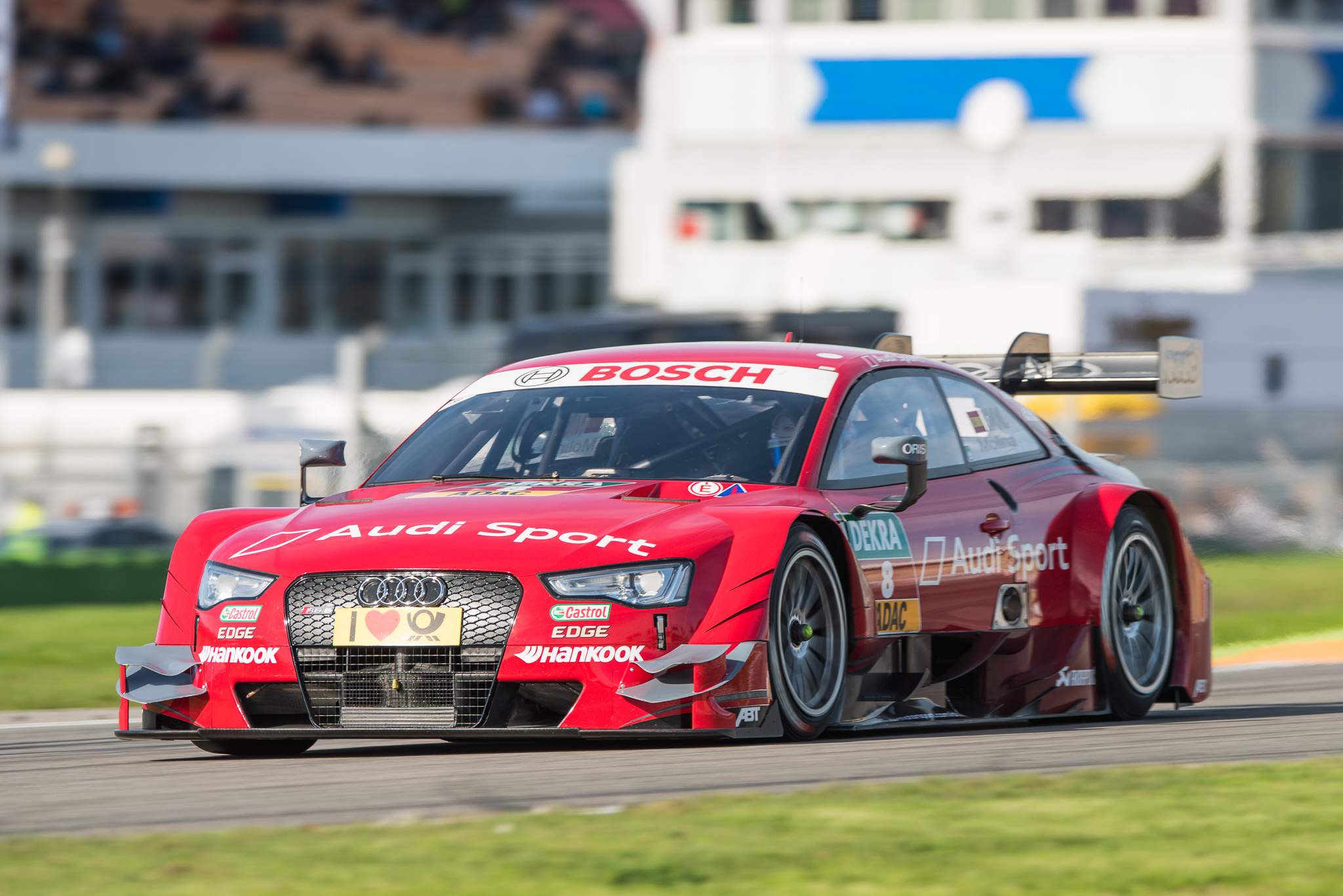 Abt Sportsline GmbH,Audi Sport Audi RS 5 DTM,DTM,Deutsche Tourenwagen Masters,Hockenheimring,Miguel Molina,Motorsport